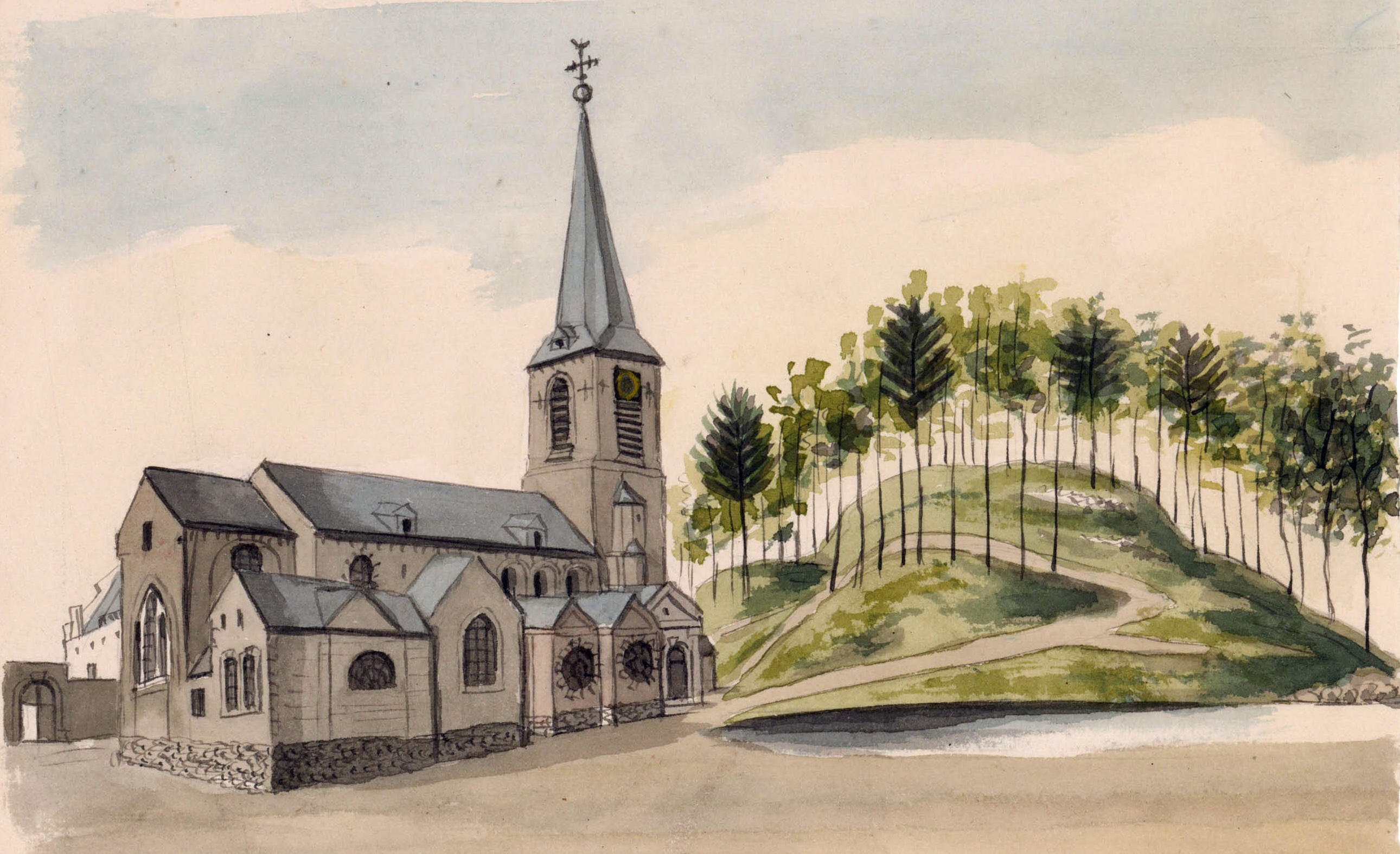 Ingekleurde tekening van Philippe van Gulpen van de kerk van Borgloon en de burchtheuvel van het voormalige kasteel van de graven van Loon. Bijschrift: Monticule ou etait situé le château ou rédidence des anciens comtes de Looz à côté de la grande Eglise de Looz ou Borgloon. Collectie Van der Noordaa in het RHCL, Maastricht, CVDN 310.